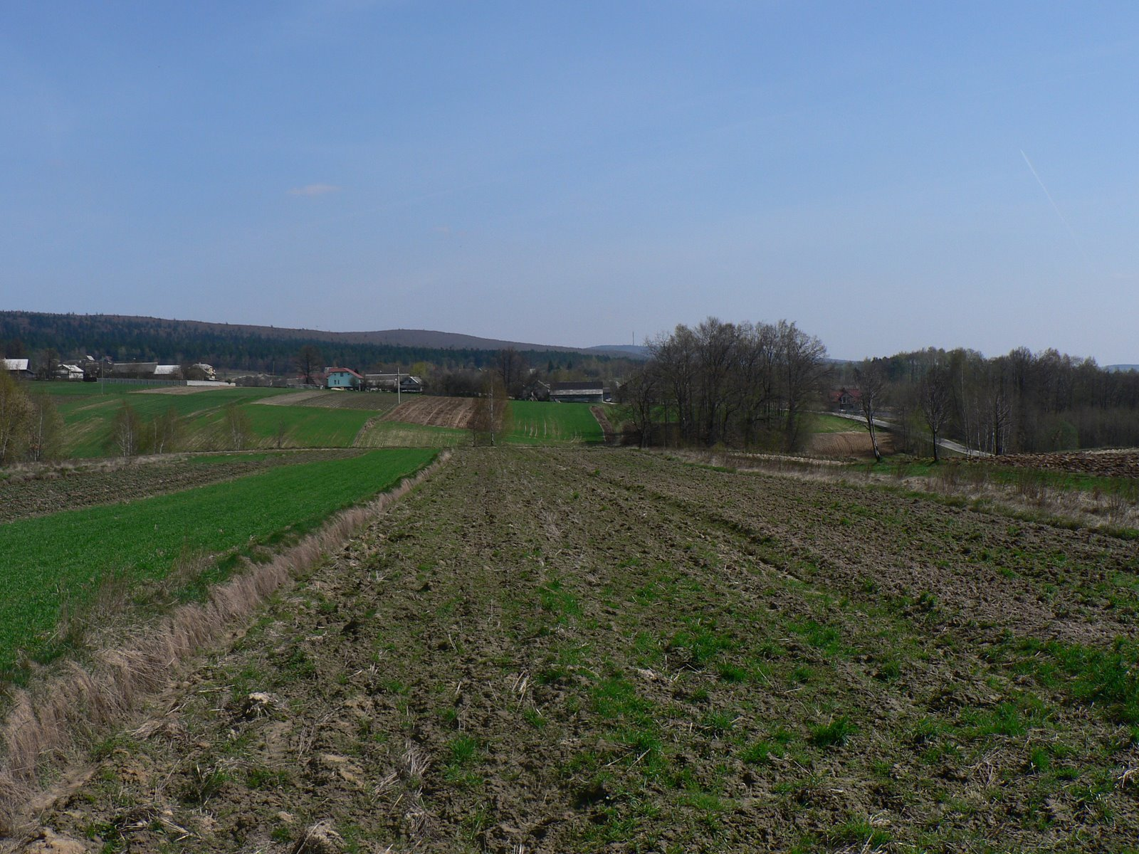 Bieliny widziane z Kakonina